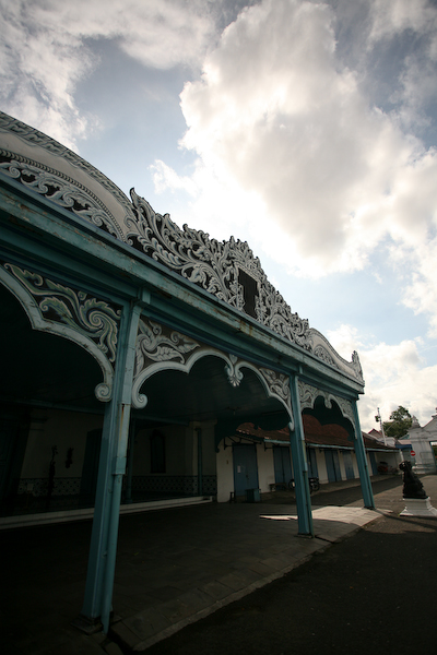 Kraton Museum.